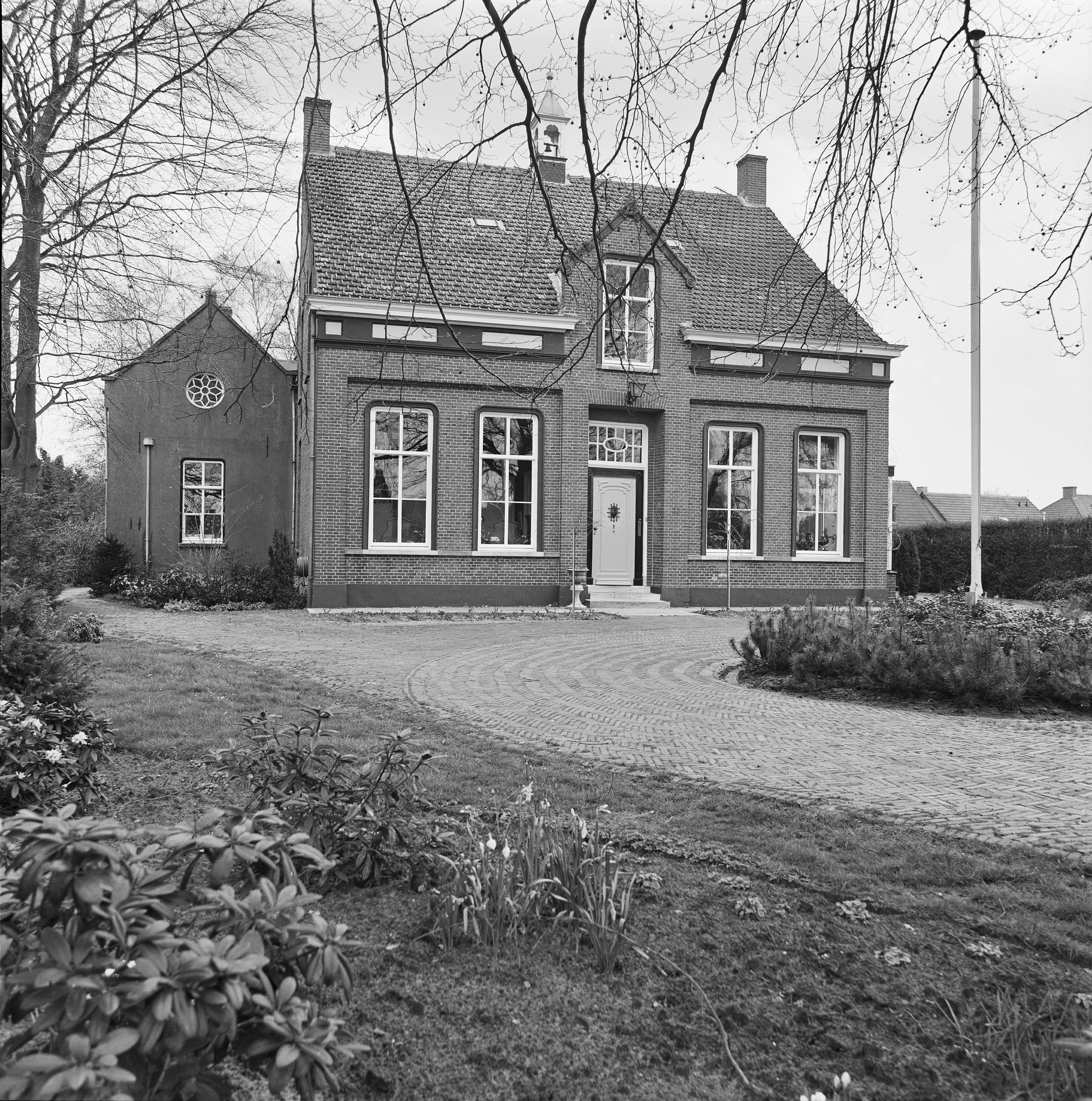 voorgevel